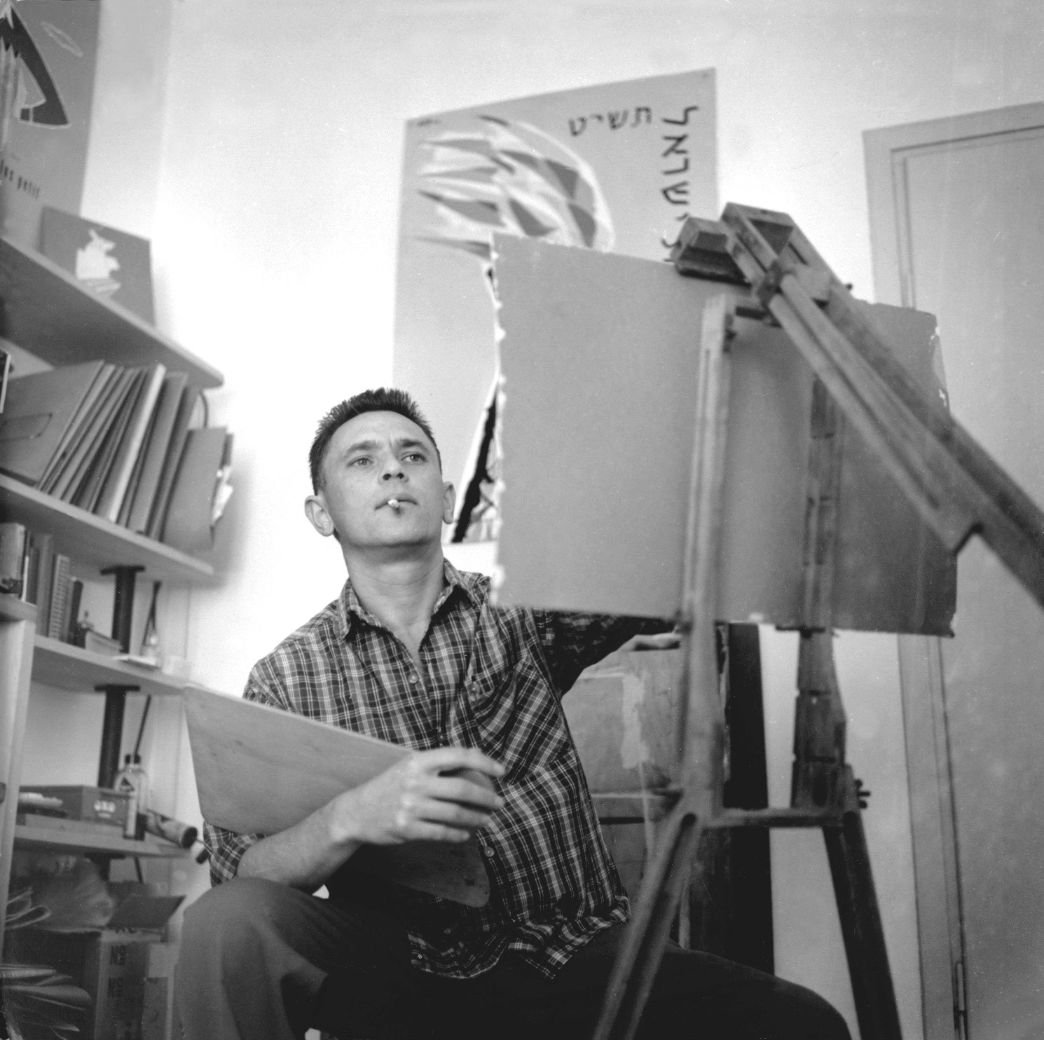 Paul Kor, 20.4.1960